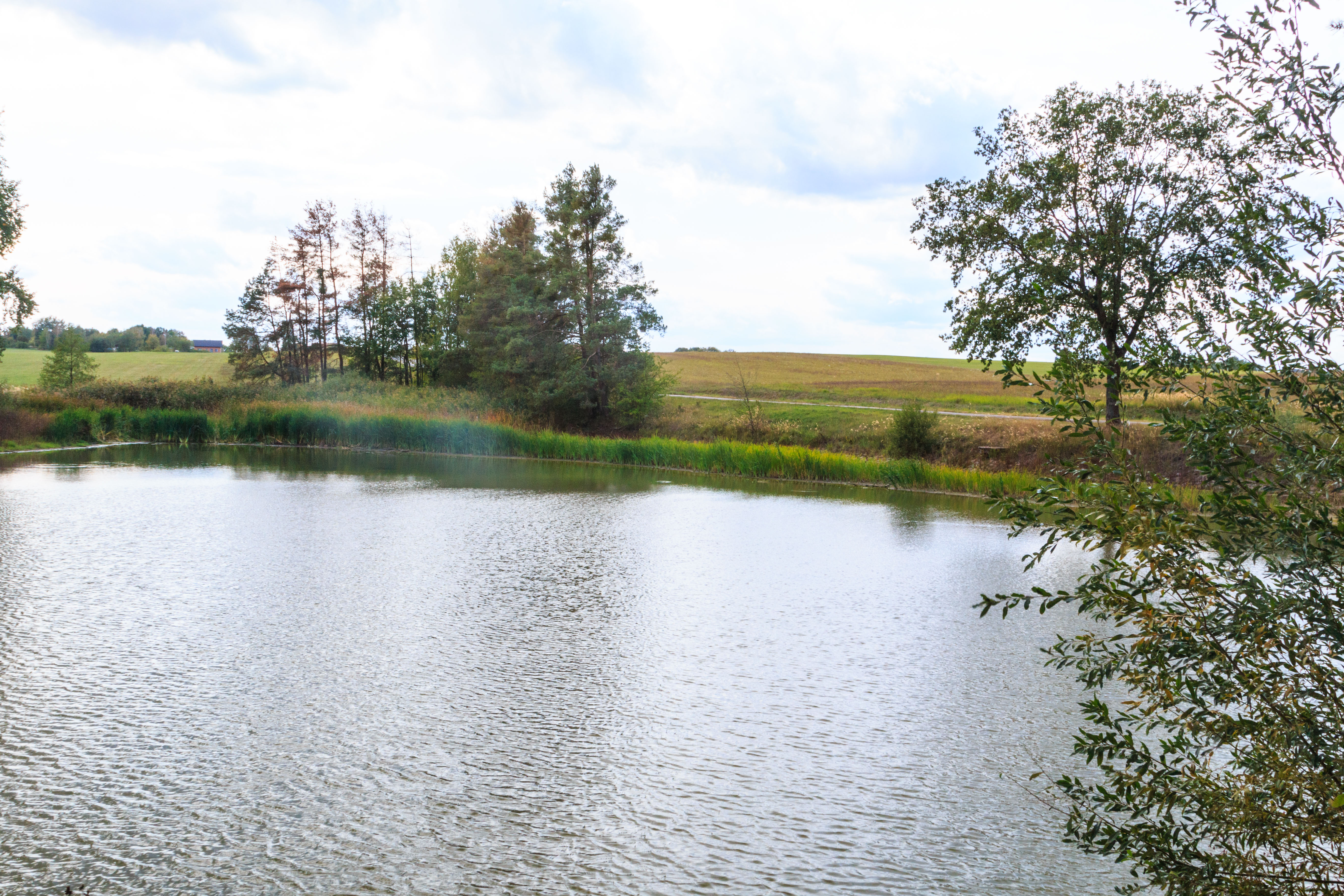 Rybník u Poběžovic Project: Vodstvo.